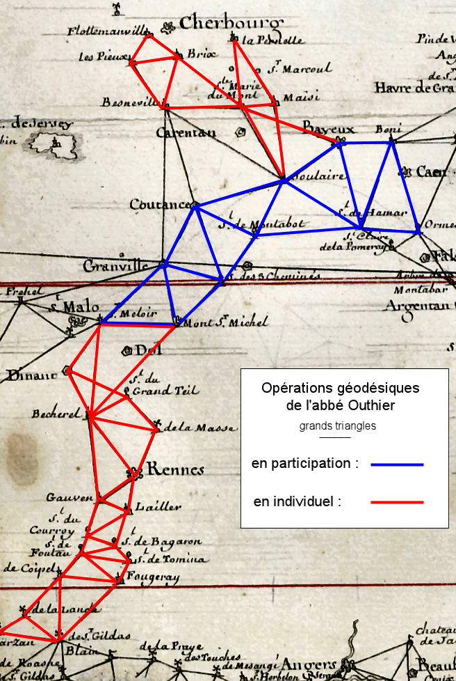 Opérations géodésiques différentiées d'Outhier en Bretagne-Normandie.